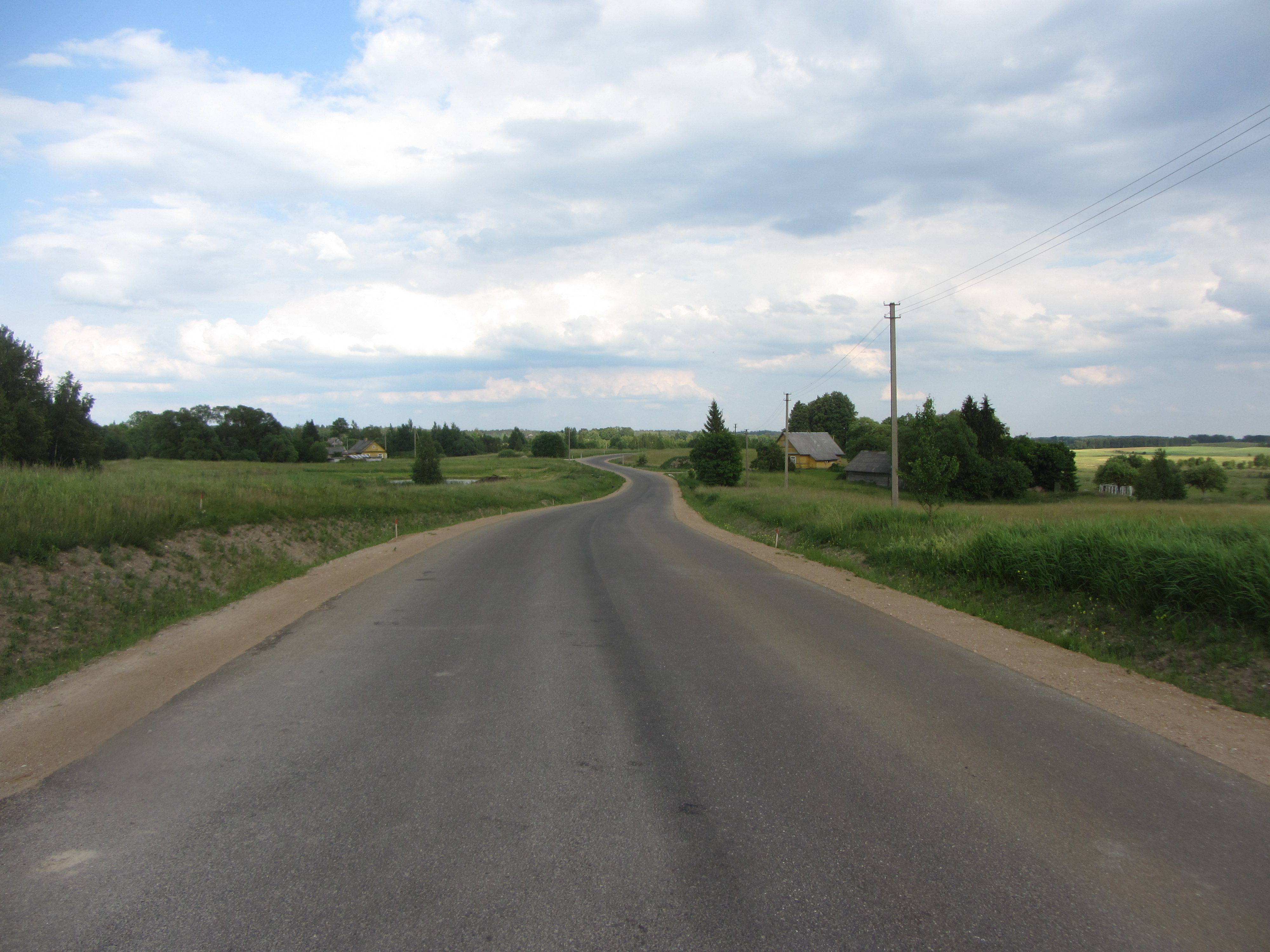 Pivašiūnų sen., Lithuania